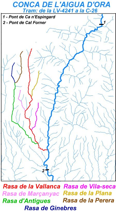 Mapa de la conca de l'Aigua d'Ora en el tram comprès entre la LV-4241 (pont de Ca n'Espingard) i la C-26 (pont de Cal Forner) en el qual s'hi ha destacat la Rasa de la Vallanca i els seus principals afluents.